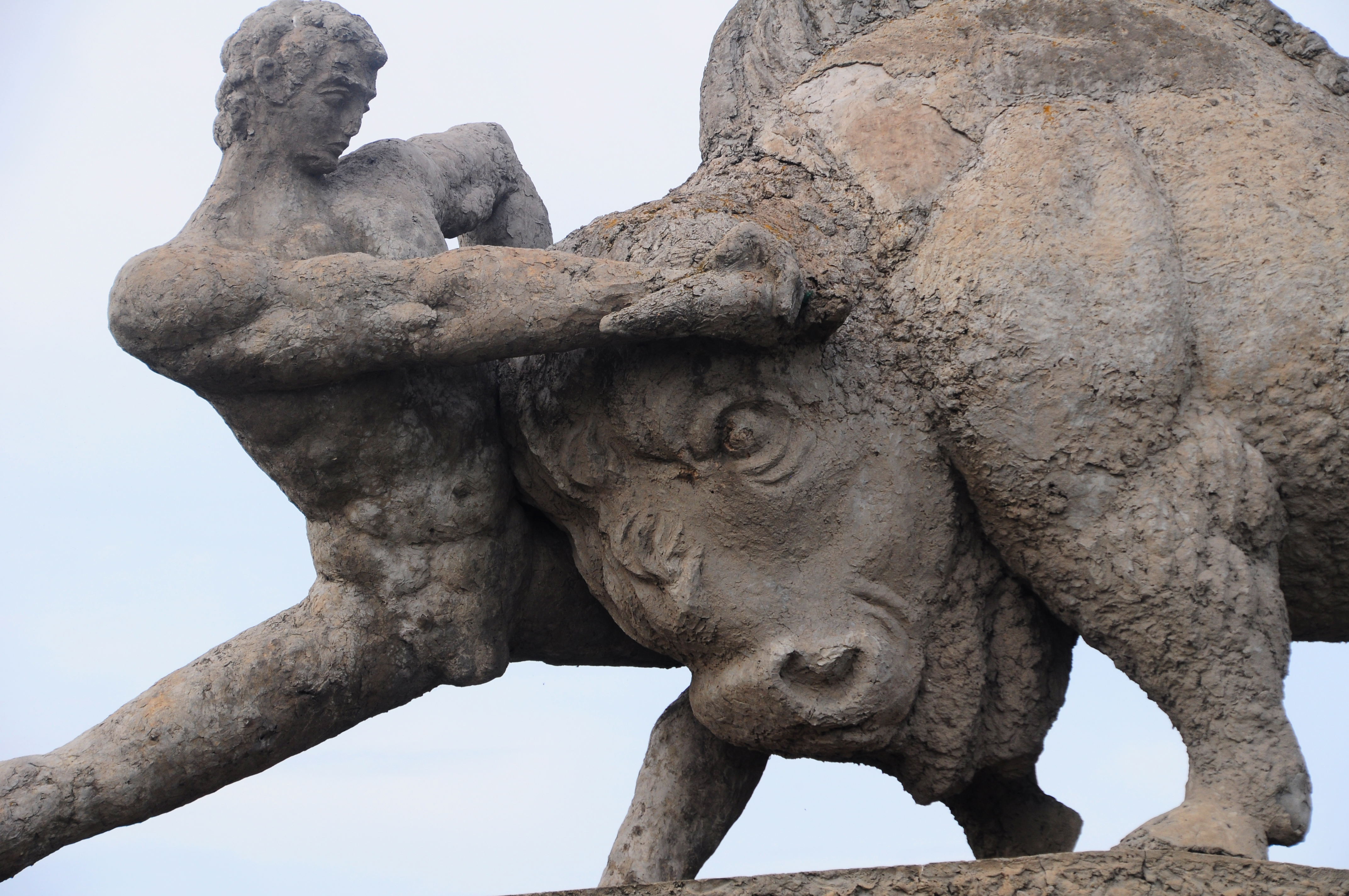 17700 Rustavi